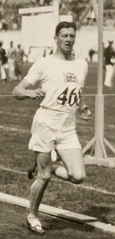 Sport. Olympische Spelen 1928 Amsterdam, Nederland : de Brit Livingstone Learmouth in de derde serie van de 400 m horden.